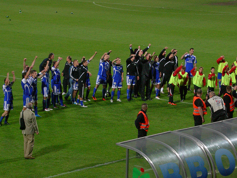 Radość piłkarzy Podbeskidzia Bielsko-Biała po zwycięskim meczu z Sandecją Nowy Sącz (2:0), gwarantującym zespołowi awans do Ekstraklasy. Zawodnicy skierowani są w stronę trybuny krytej Stadionu Miejskiego w Bielsku-Białej.